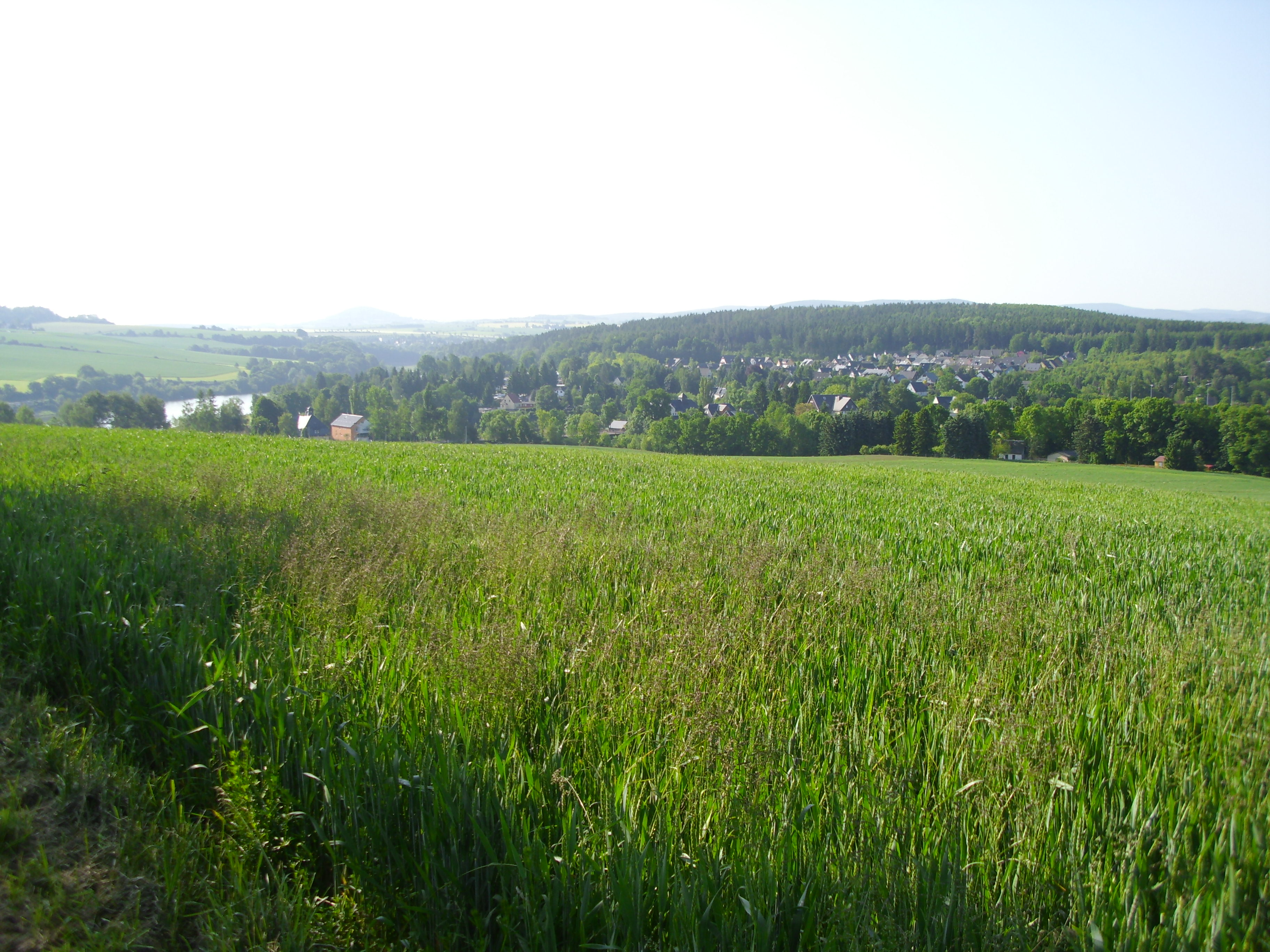 Vom Wildsteig in Seifersdorf blickend auf Paulsdorf mti der Neuen Häuslersiedlung, den Mühlefeld, Links im Bild die Alte Schule. und den Waldgebiet Böthchen.